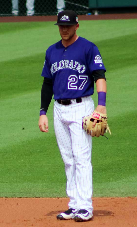 Trevor Story